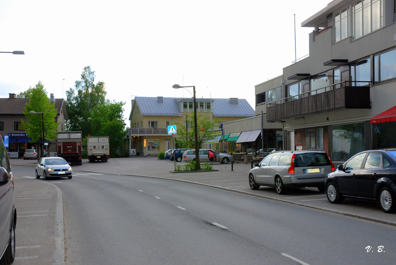 Vihti. Foto Victor Belousov.